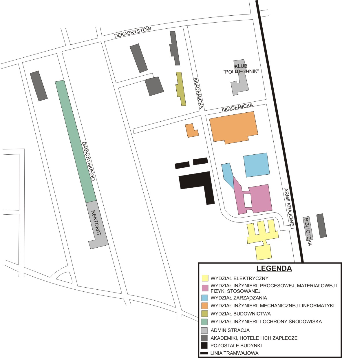 Szkic położenia budynków Politechniki Częstochowskiej i odpowiadające im jednostki administracyjne. Mniejsze ulice i nazwy większości ulic pominięto. Autor szkicu: Reytan